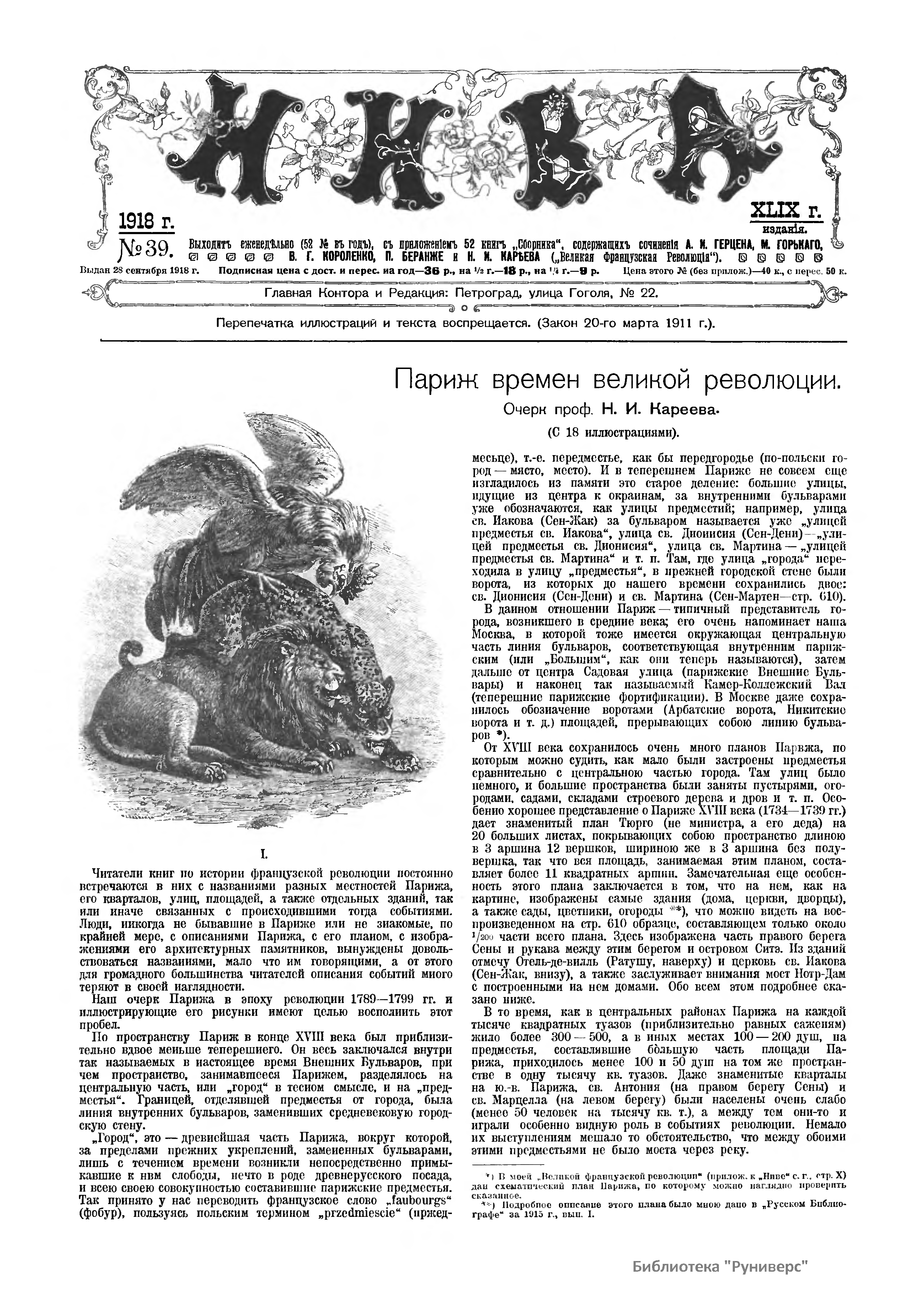 Обложка последнего номера журнала Нива от 28 сентября 1918 года